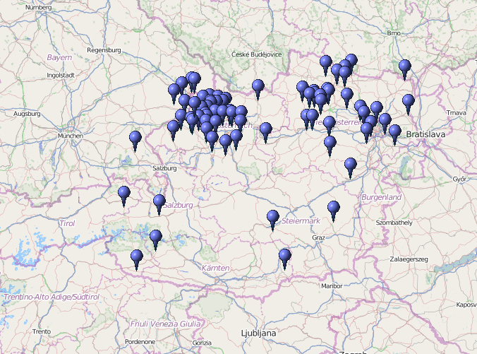 Verbreitung des Toponyms und Siedlungsnamens "Parz"